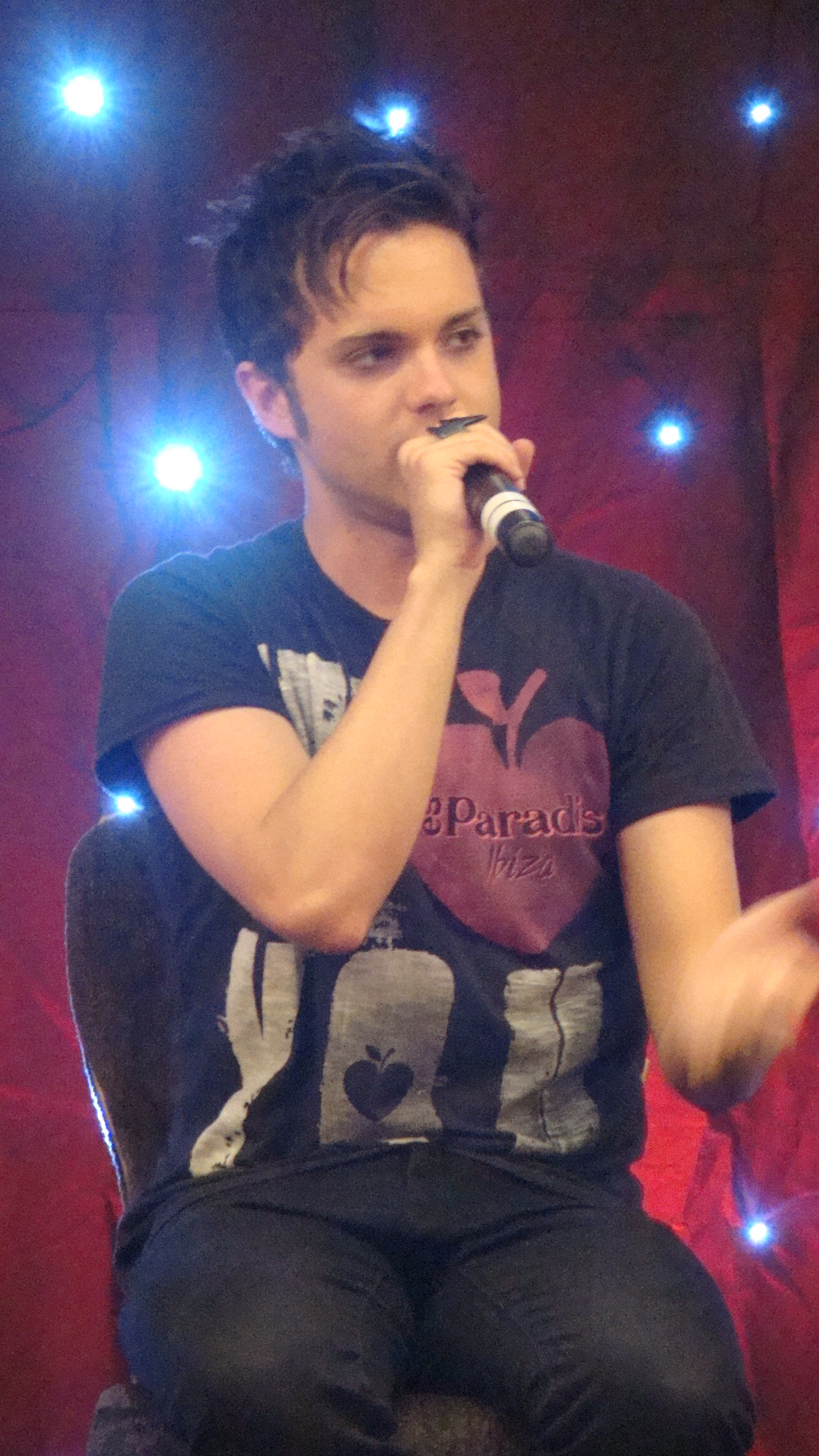 Thomas Dekker